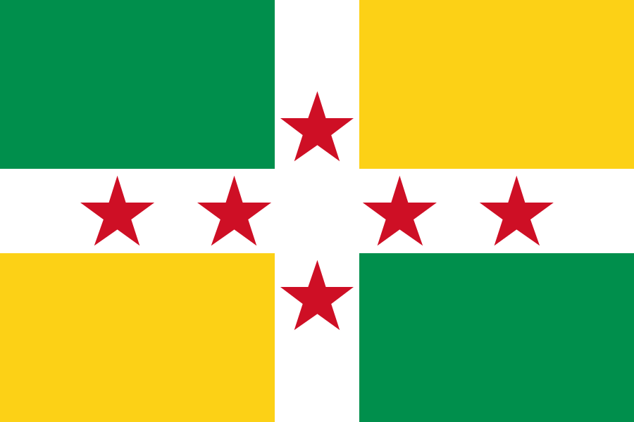 Bandera de Santa Ana de Vuelta Larga